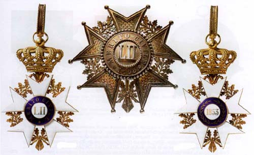 Order Zasługi Cywilnej (Toskania)